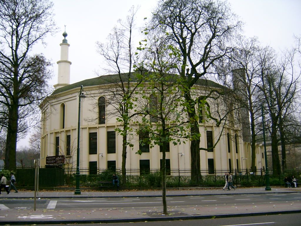 Vue de la Grande Mosquée de Bruxelles en 2012